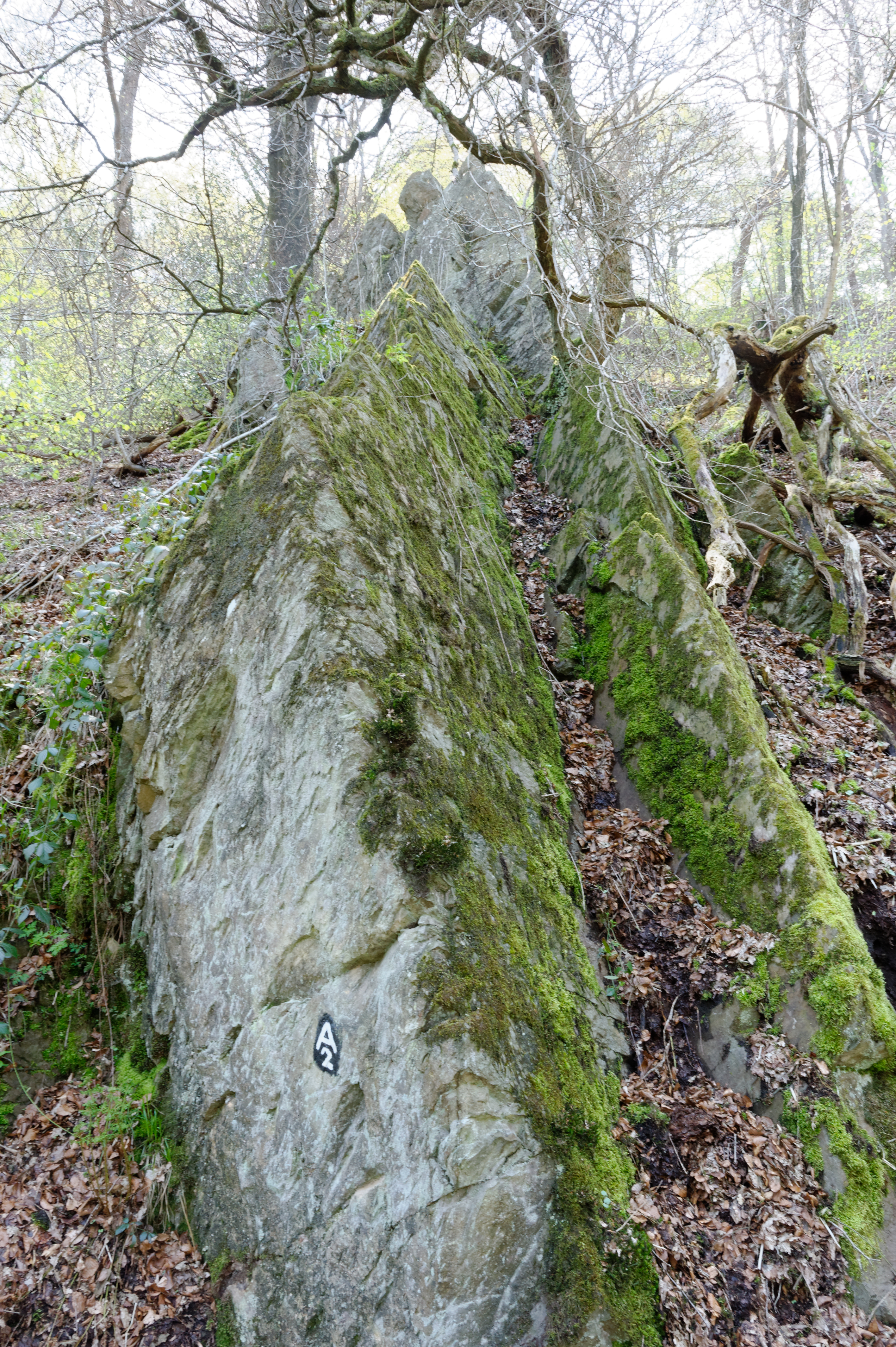 Naturschutzgebiet Unteres Morsbachtal mit Hölterfelder Siefen und Fürberger Bachtal